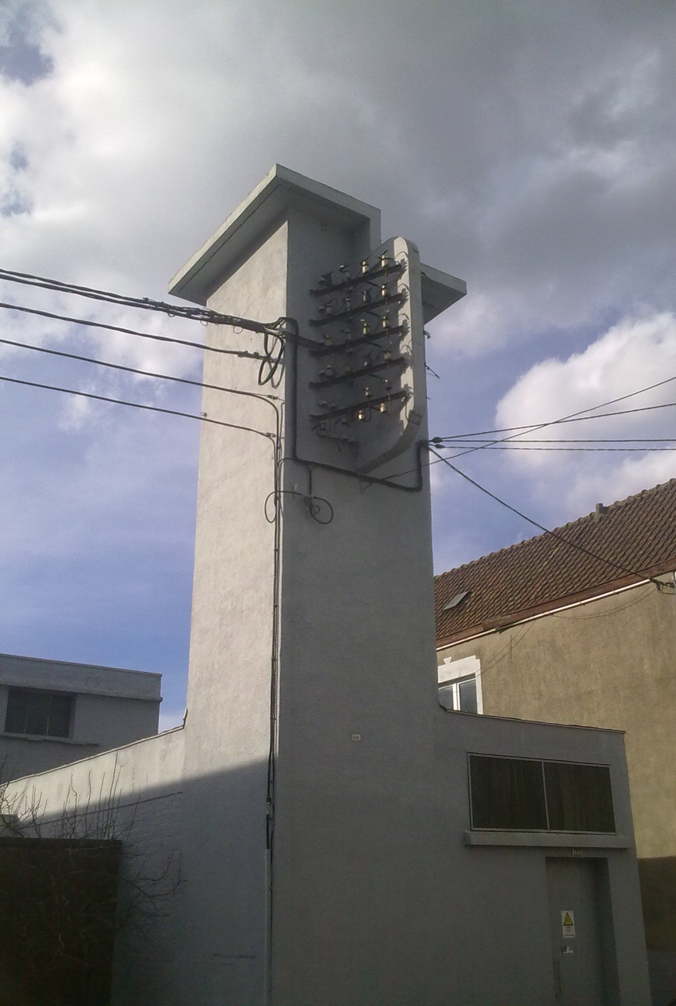 Bâtiment de cabine électrique (pour anciennes lignes aériennes) rue du Monument à Ottignies.